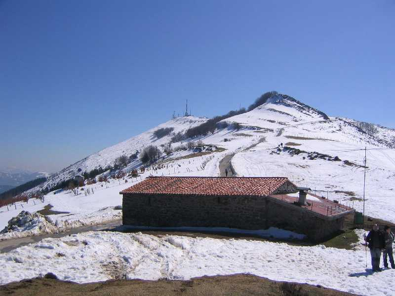 Monte Oiz, Vizcaya, País Vasco, España. Vista de la cumbre del Oiz desde la ermita de San Cristobal.